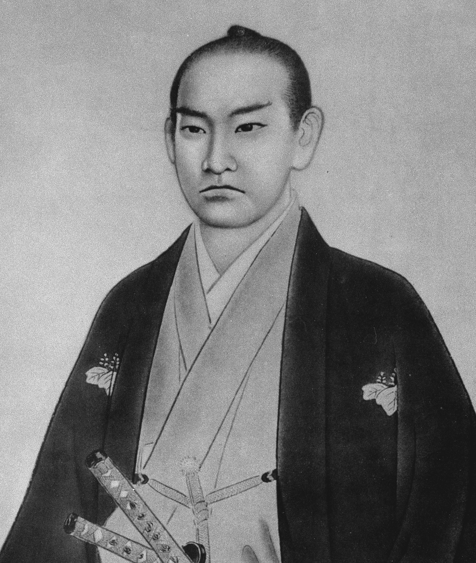 橋本左内肖像画（島田墨仙作）福井市立郷土歴史博物館蔵